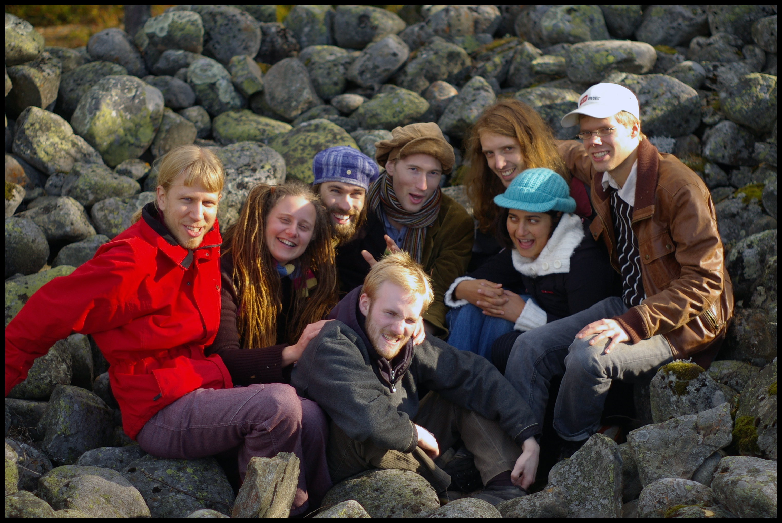 Kelkaj partoprenantoj de Oranĝa Renkontiĝo en 2007.